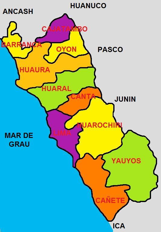 Imagen que muestra la División Politica del Departamento de Lima, una de las 25 circunscripciones en que se divide el Perú